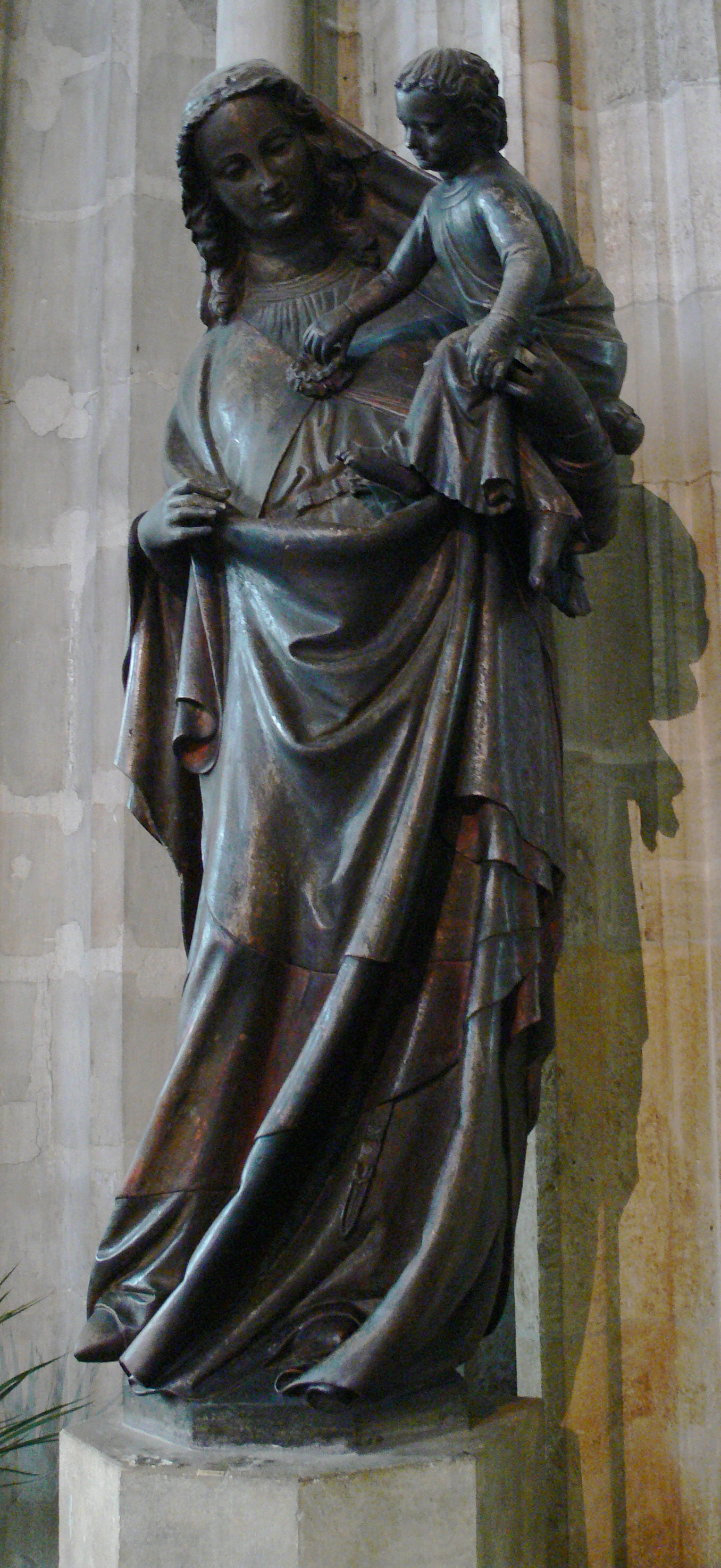 Wien, Stephansdom, „Dienstbotenmadonna“, Frankreich oder Rheinland, um 1300